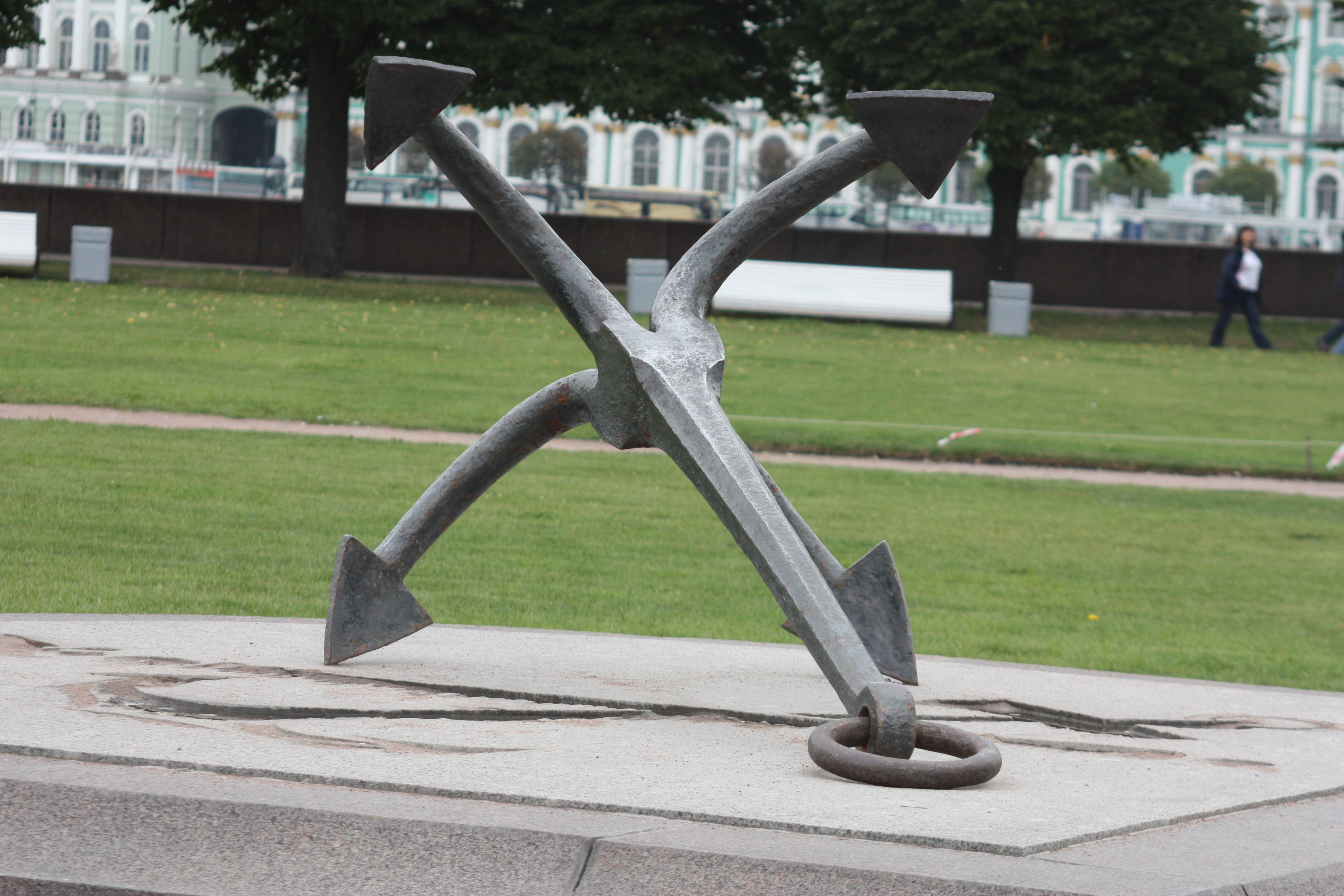 Sankt Petersburg; 2009; Touristenfotos